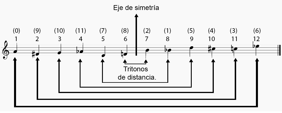 Tritonos de la serie simétrica de la opus 21 de Webern.